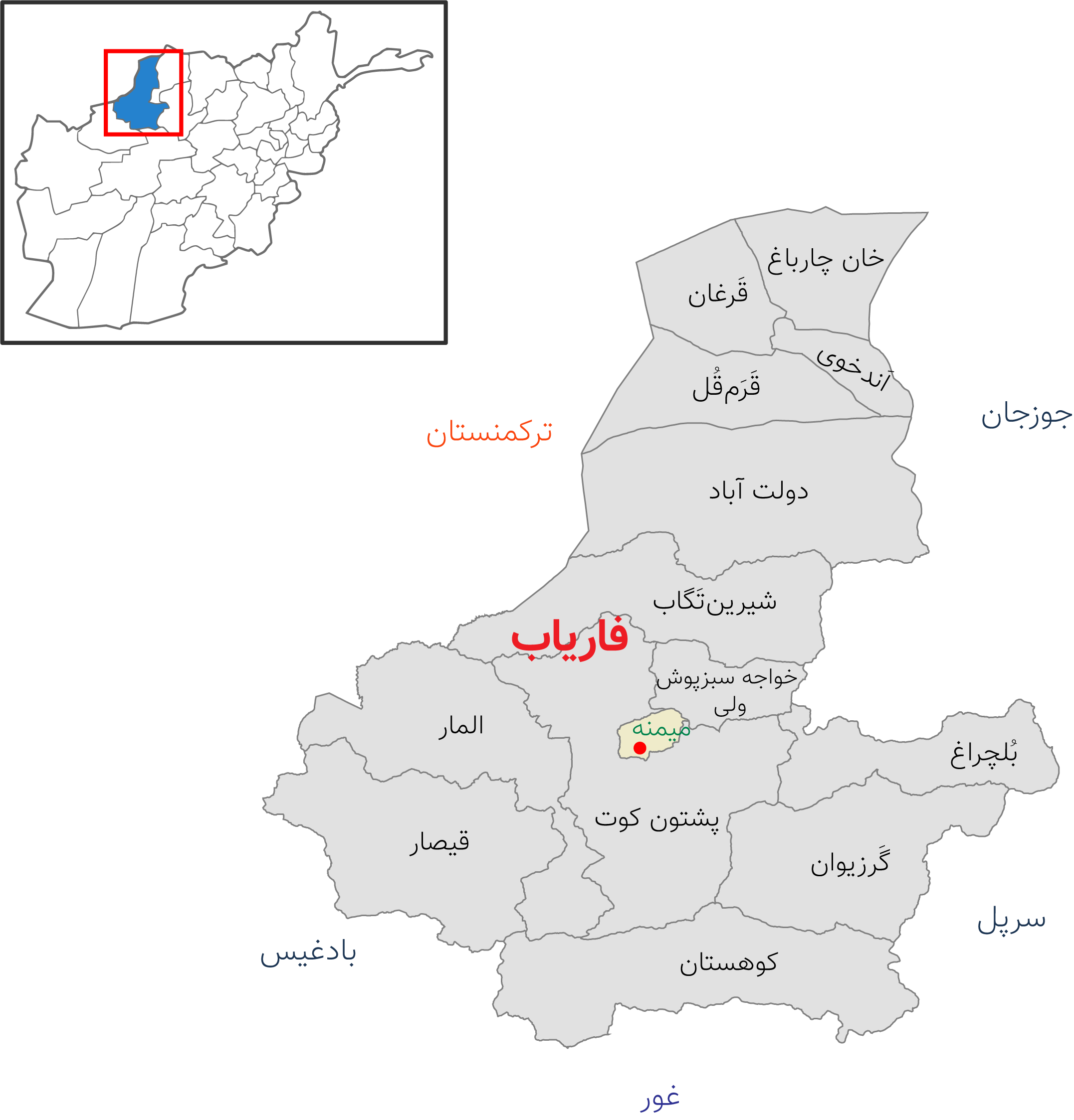 نقشه ولایت فاریاب